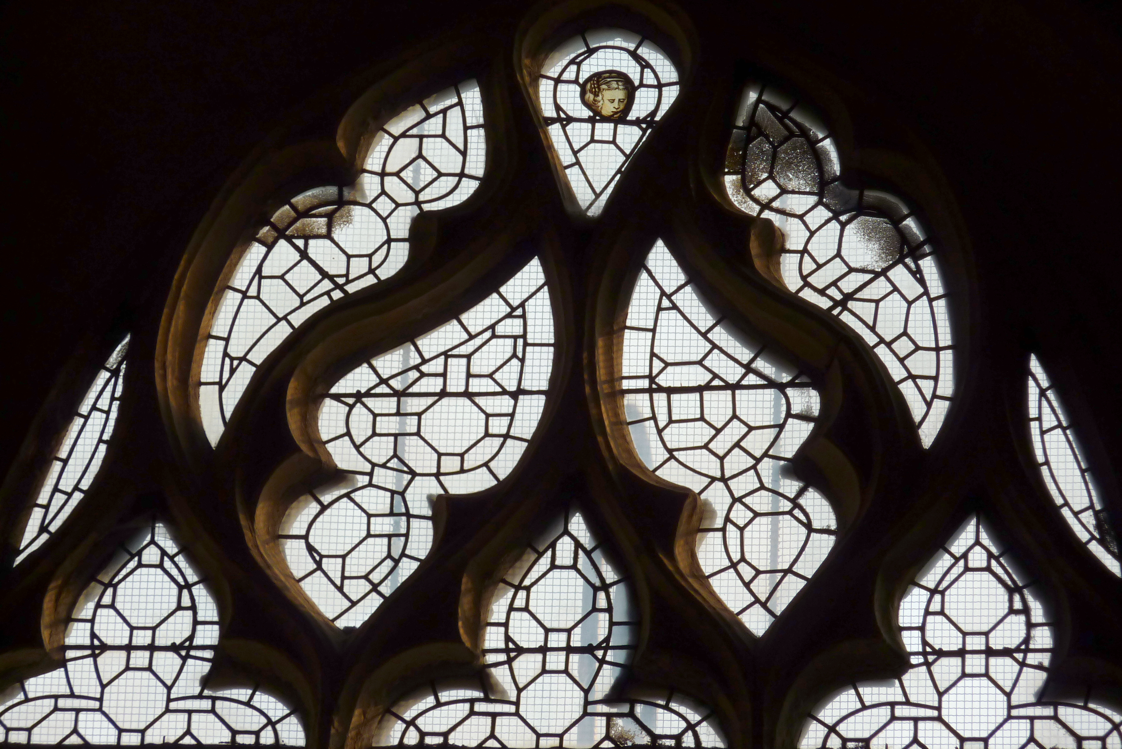 Bleiglasfenster in der Kirche Saint-Didier in Villiers-le-Bel